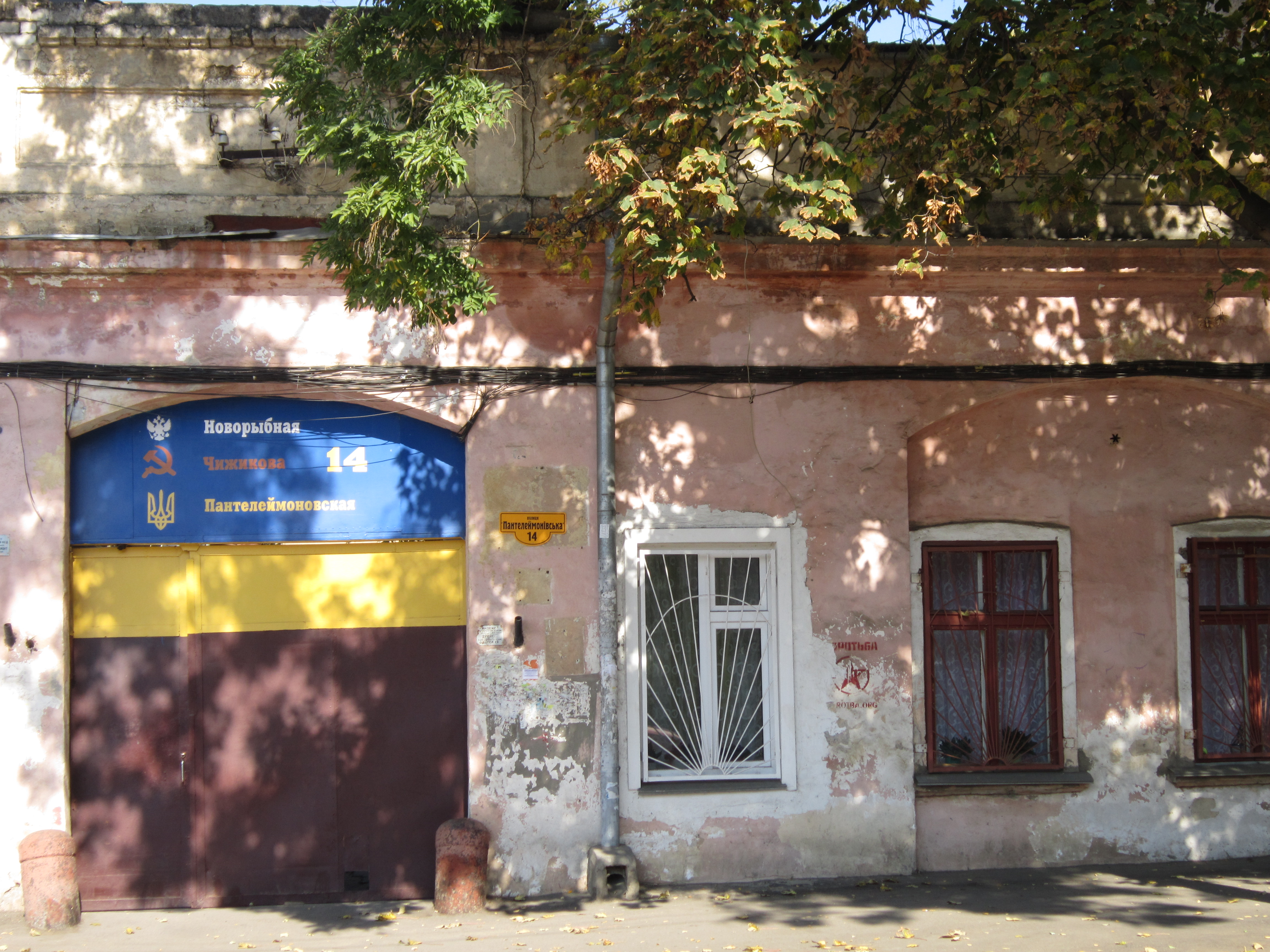 Будинок, в якому жив К.І. Чуковський - письменник, критик, літературознавець, перекладач, Одеса, Пантелеймонівська вул., 14